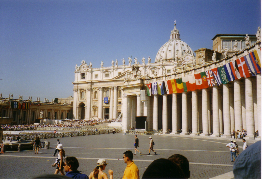 Der Petersdom während des Weltjugendtages 2000